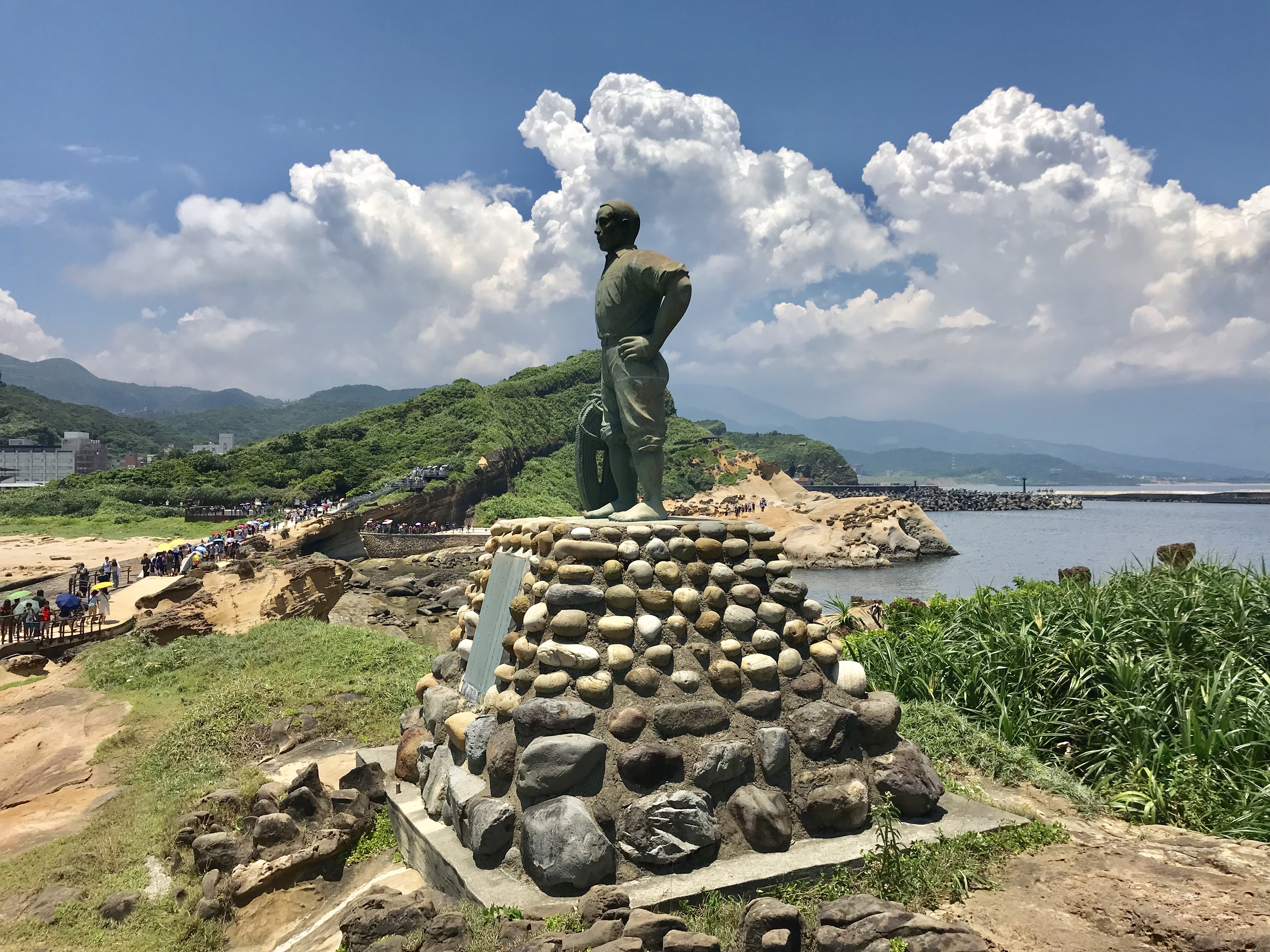 中文（台灣）: 林添禎銅像側面照